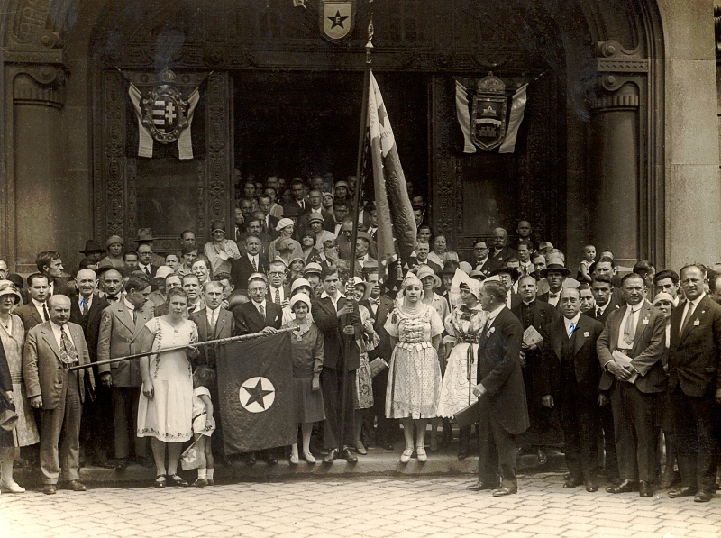 21. Esperanto-Weltkongress, Budapest 1929. Gruppenfoto einiger Teilnehmer vor dem Kongressgebäude